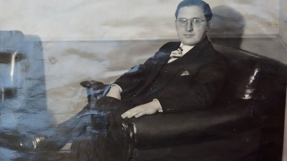 Nicolás Alfredo Alessio - el compositor